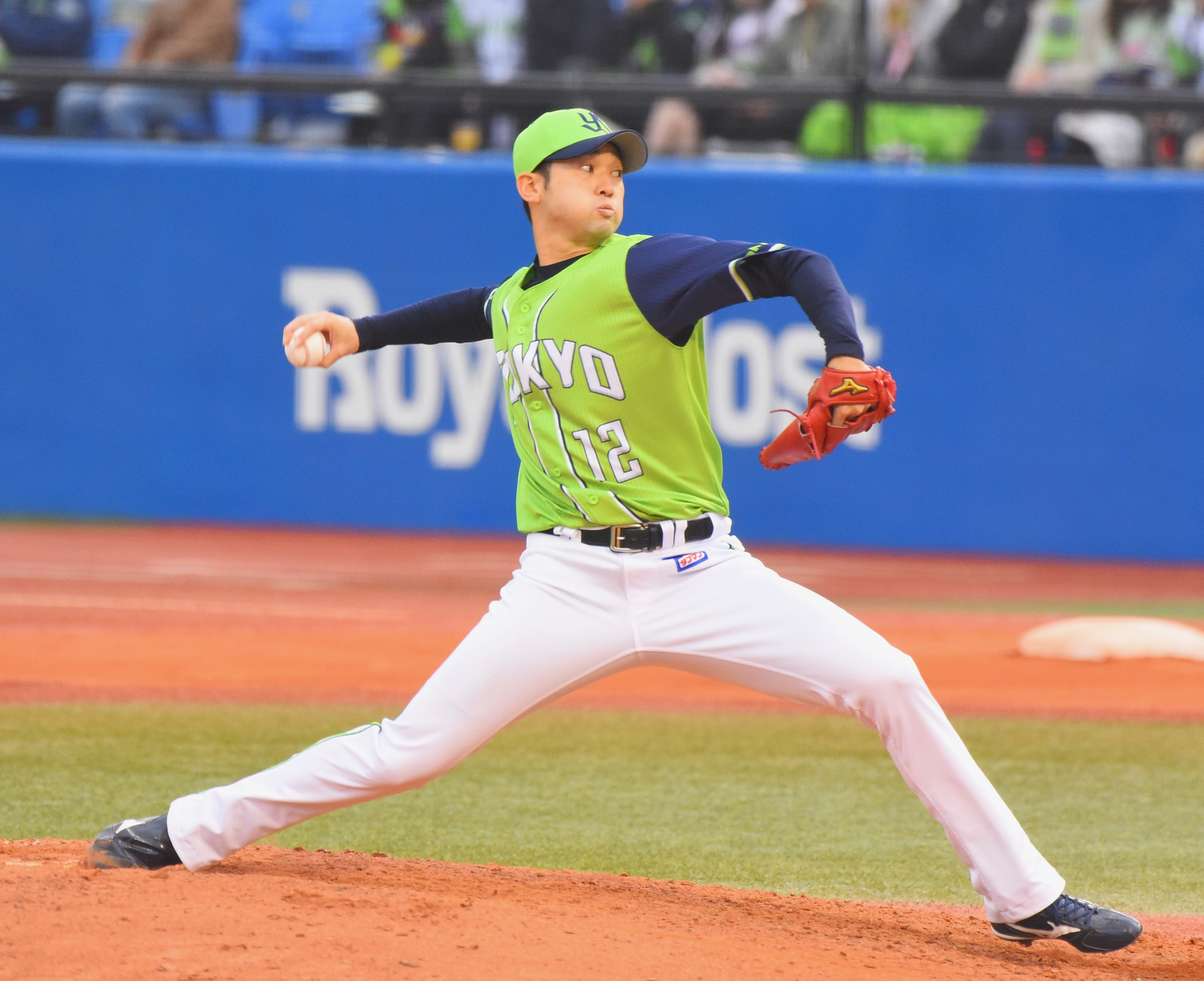 東京ヤクルトスワローズ 石山泰稚 2018年4月7日